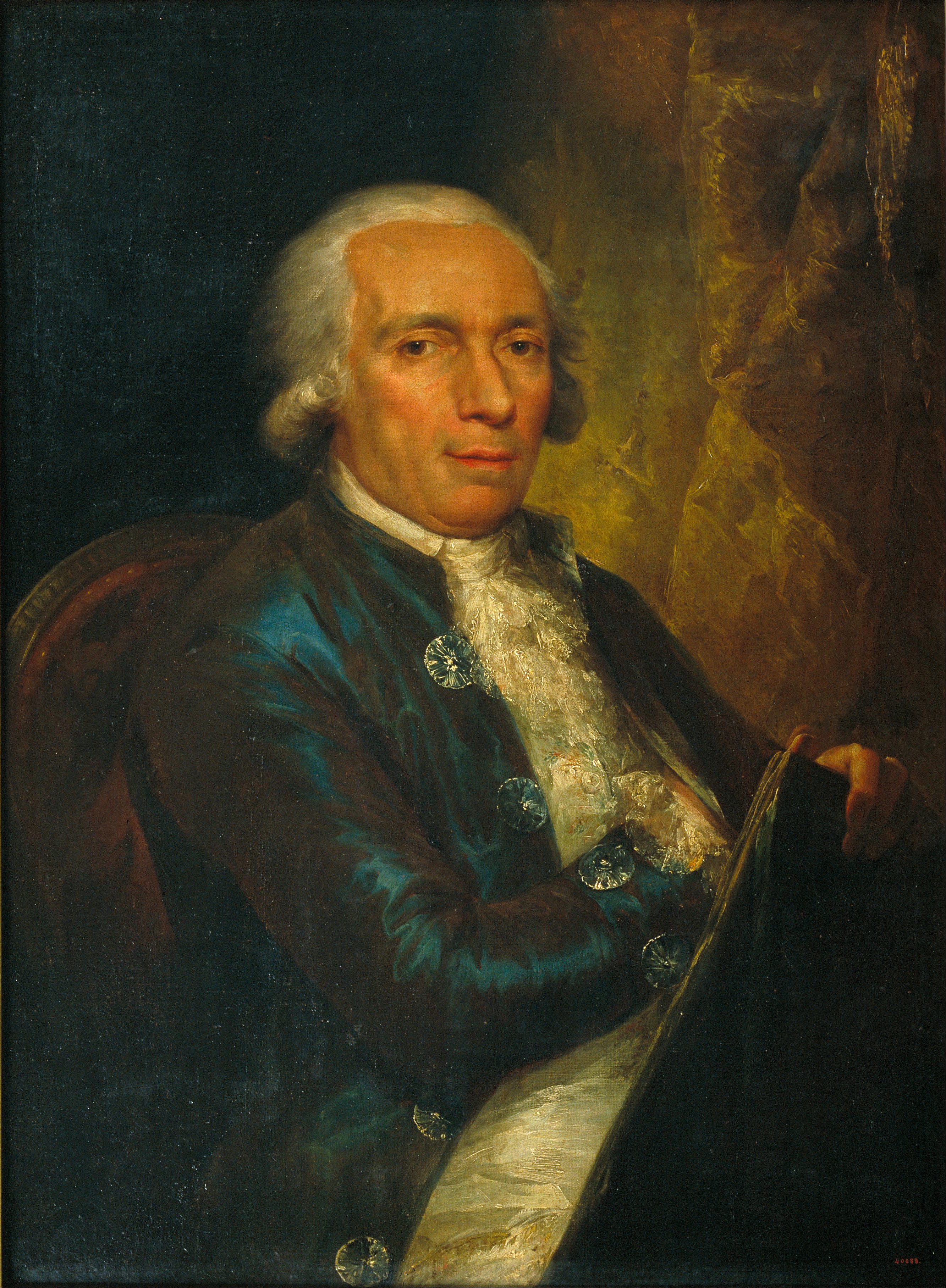 Retrato del grabador español Pasqual Pere Moles (1741-1797).